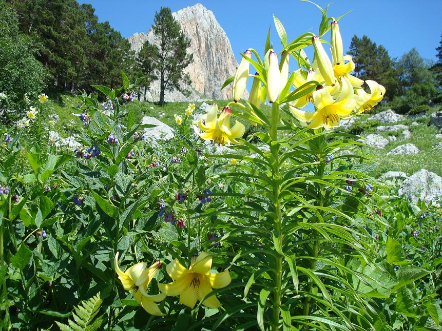 Кавказская лилия, занесенная в Красную книгу